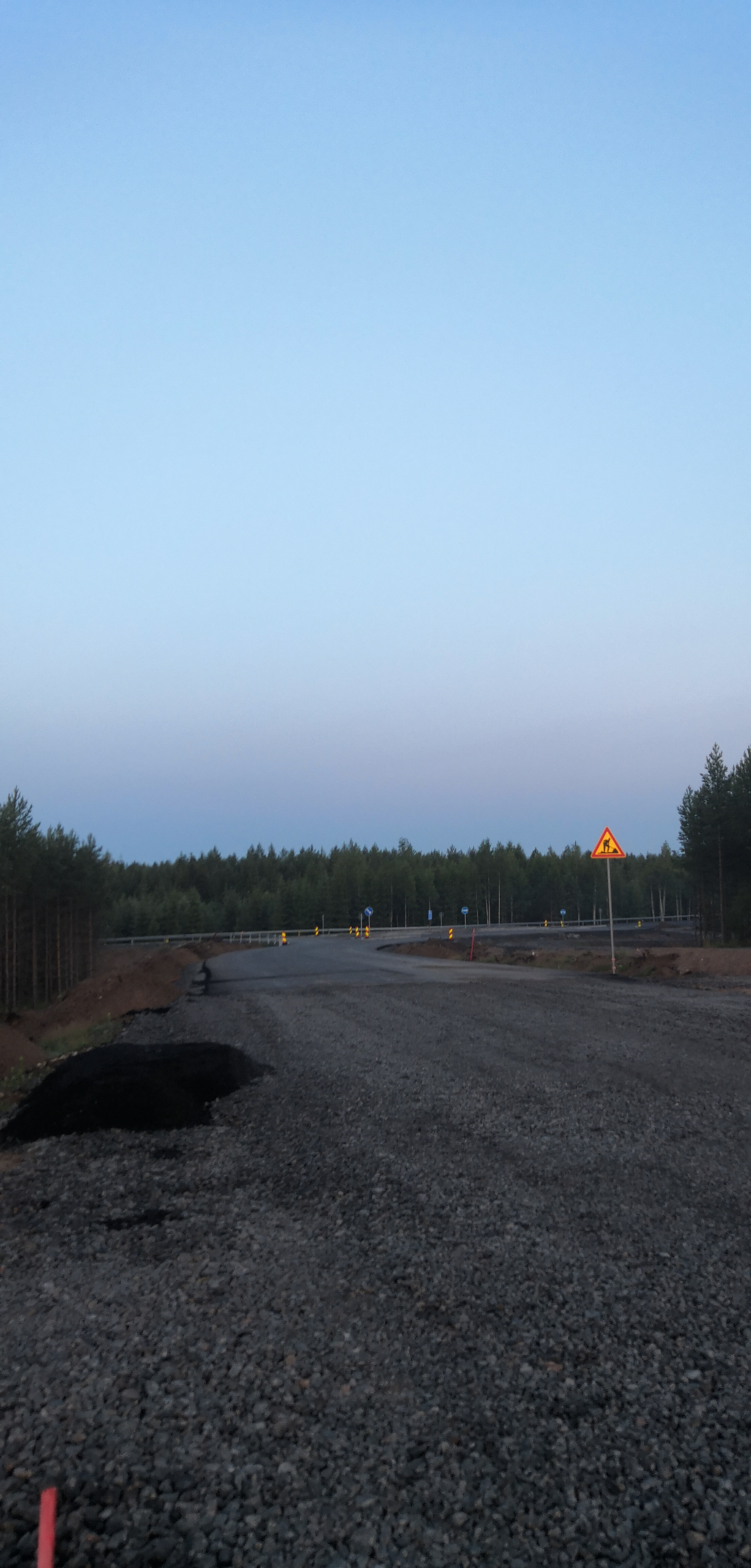 Valtatie 12 Tillolan liittymän rakennustyömaa